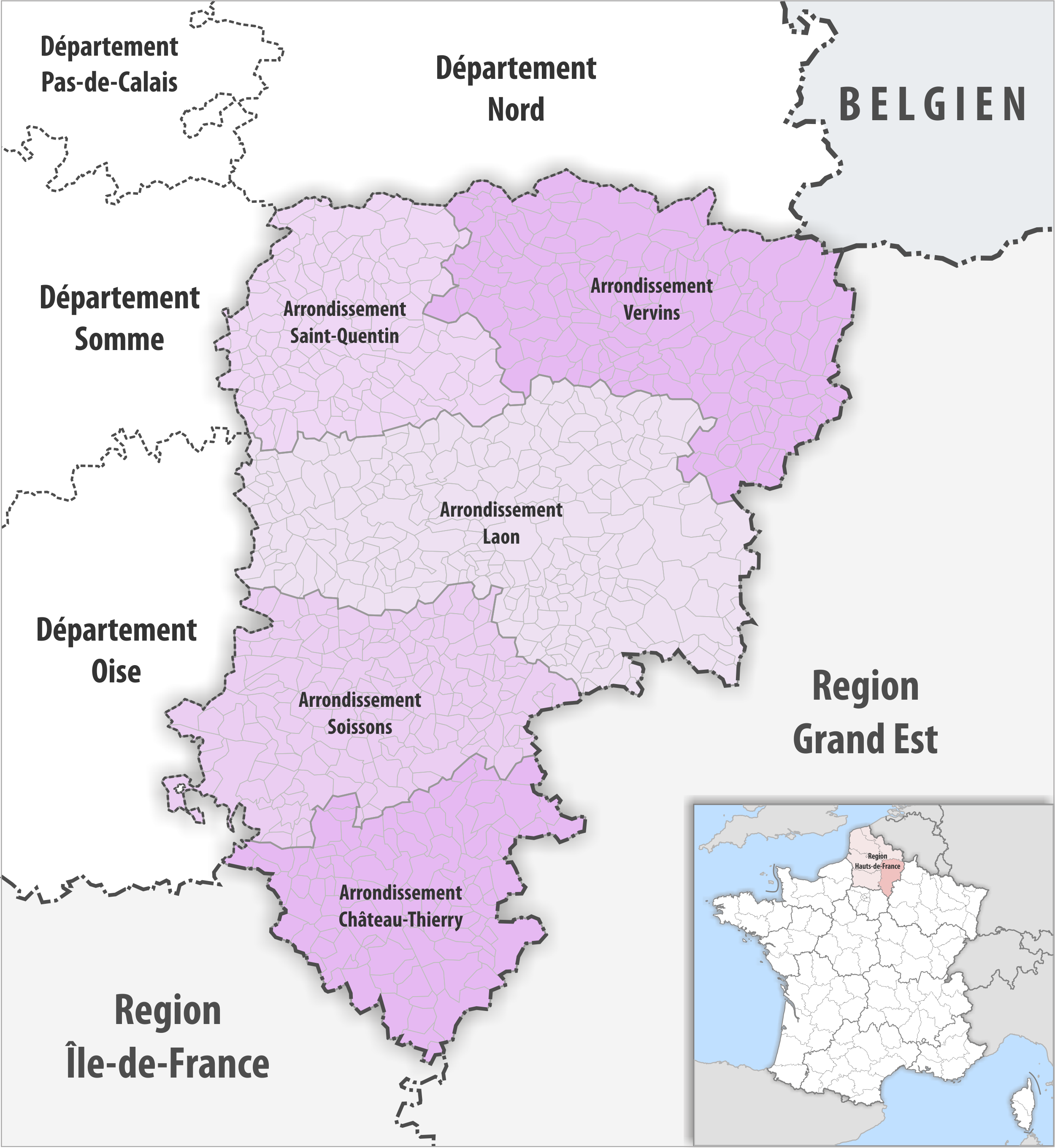 Gemeinden und Arrondissemente im Departement Aisne